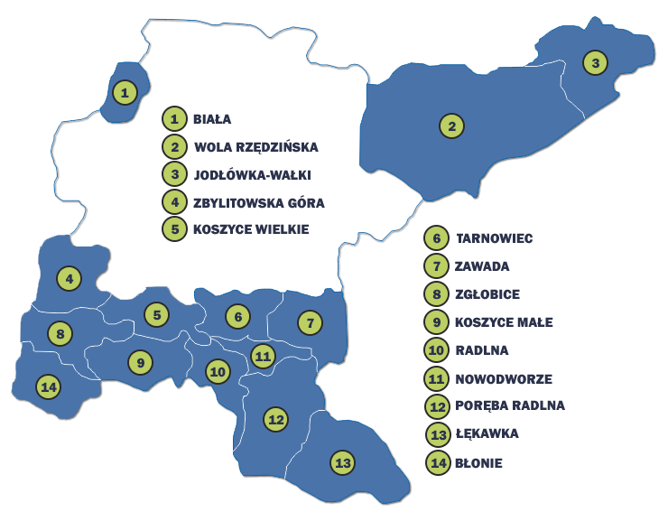 Mapa Gminy Tarnów